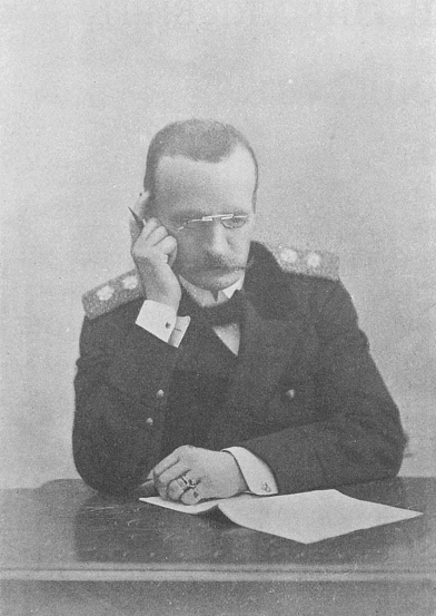 Александр Александрович Мусин-Пушкин, вологодский и минский губернатор.